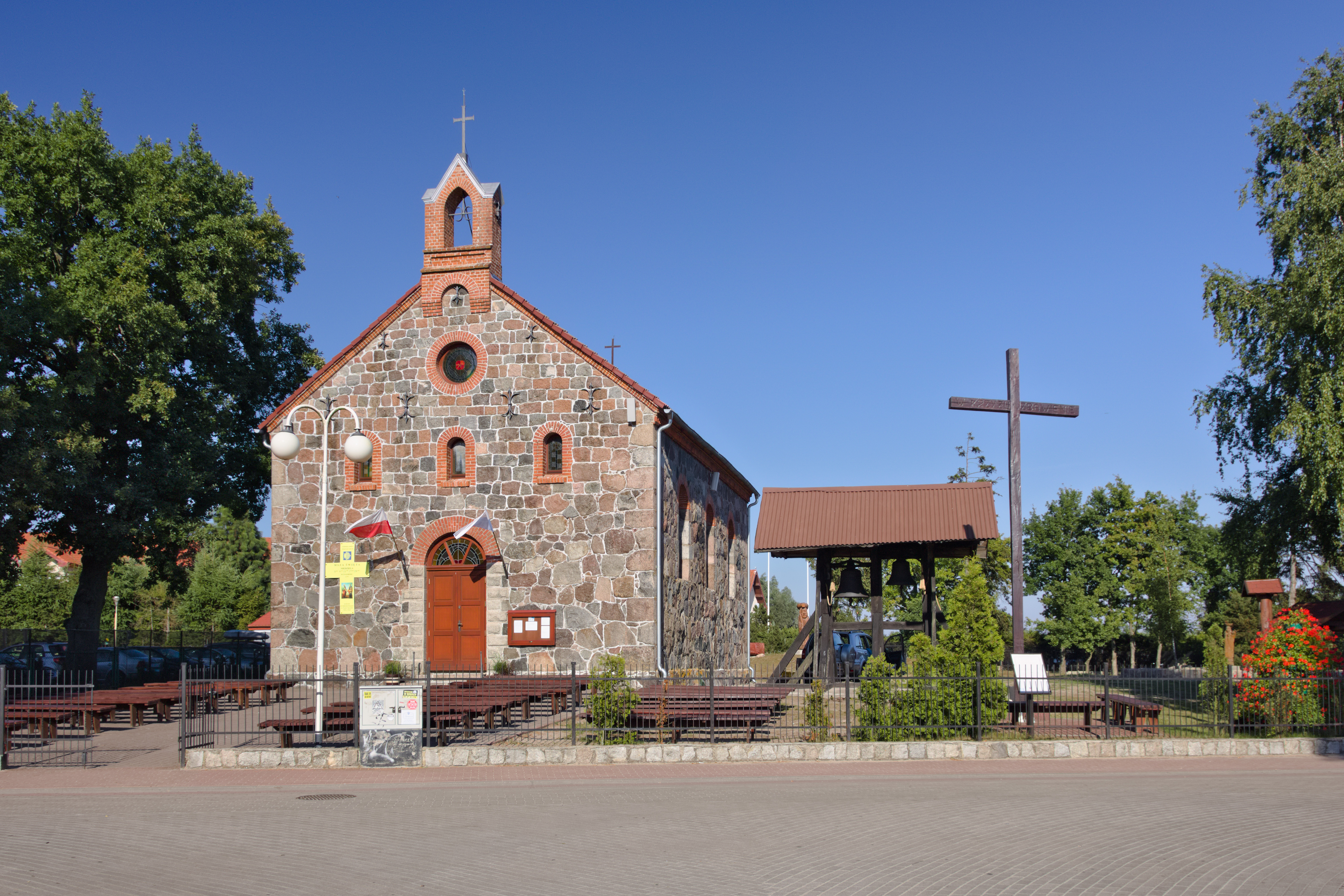 Kościół pw. św. Apostołów Piotra i Pawła w Rowach